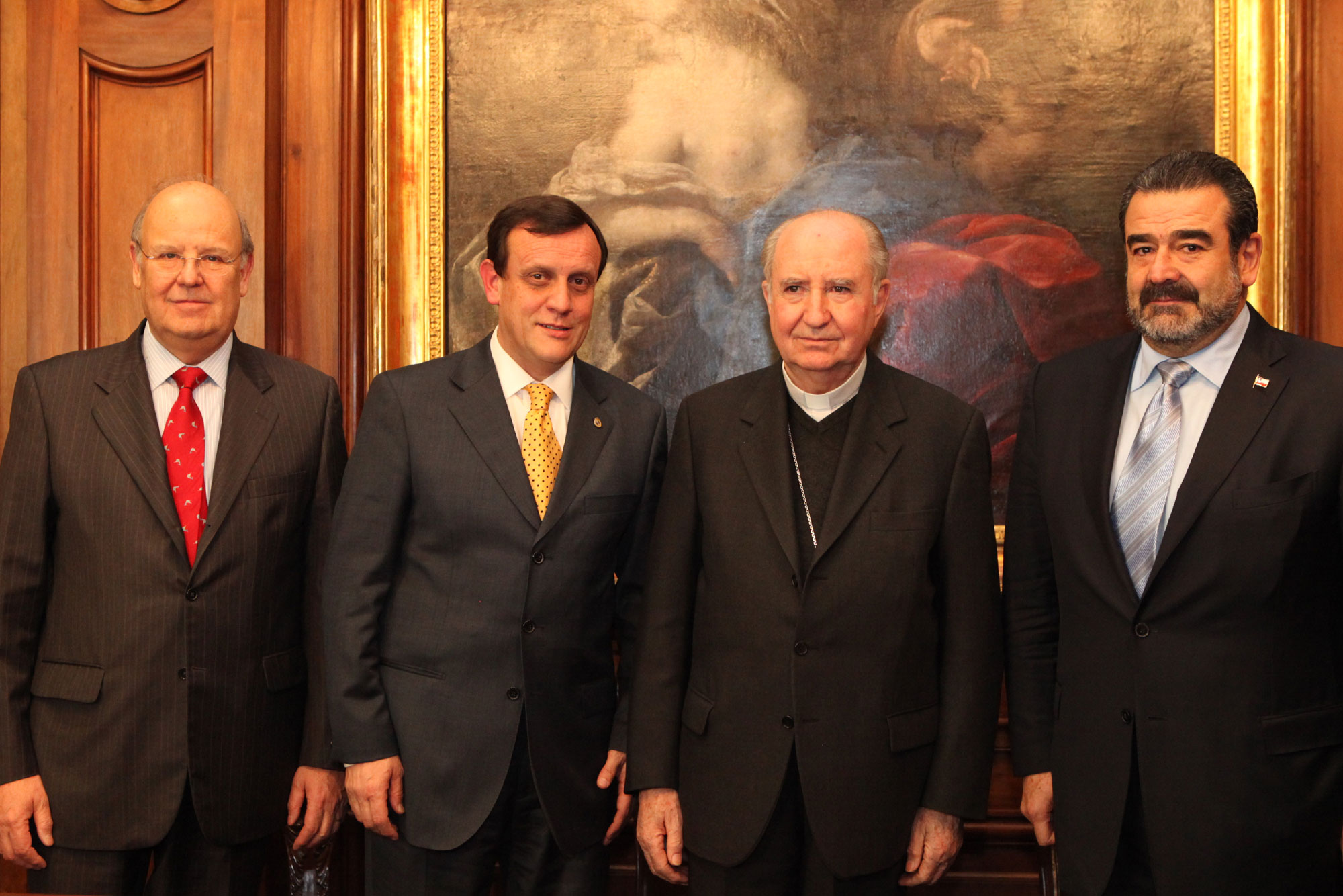 El convenio fue firmado por el rector Ignacio Sánchez y Andrónico Lukšić, con la presencia del Gran Canciller de la Universidad Católica, Monseñor Francisco Javier Errázuriz.